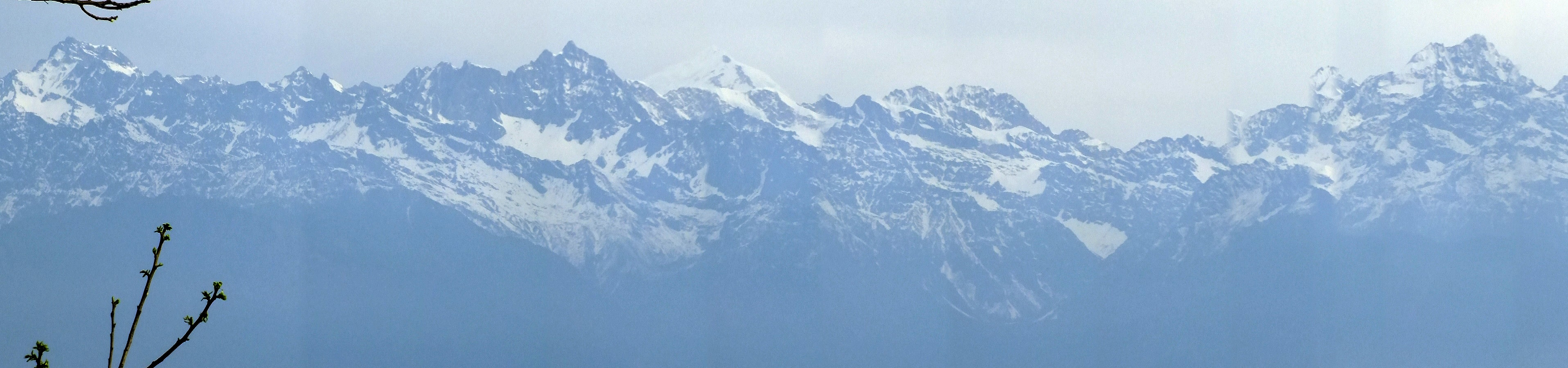 2015-03-18 Nagarkot Annapurna